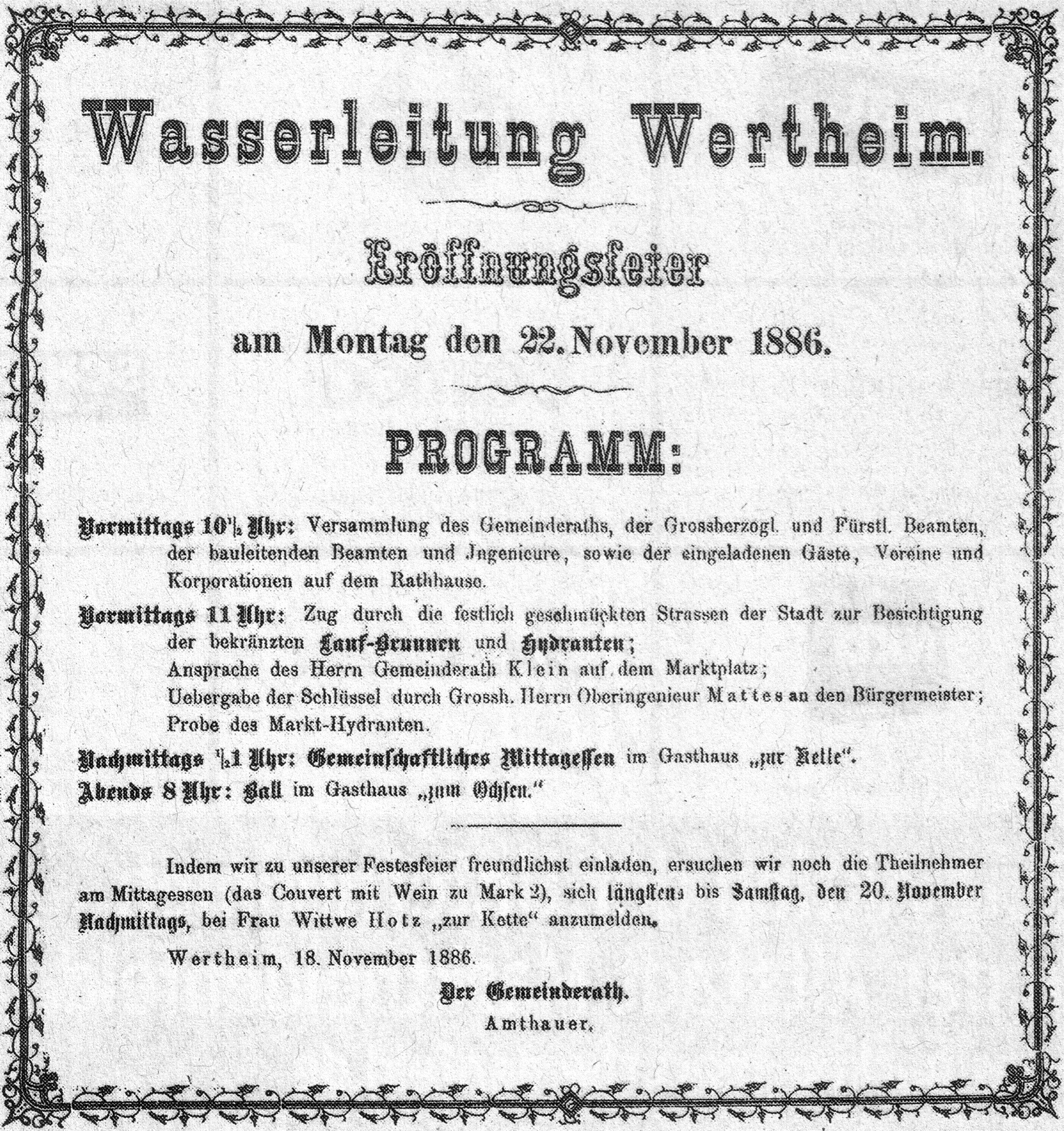 Einladung zur Eröffnungsfeier anlässlich der Installation der Wasserleitung in Wertheim 1886 (öffentlicher Aushang)